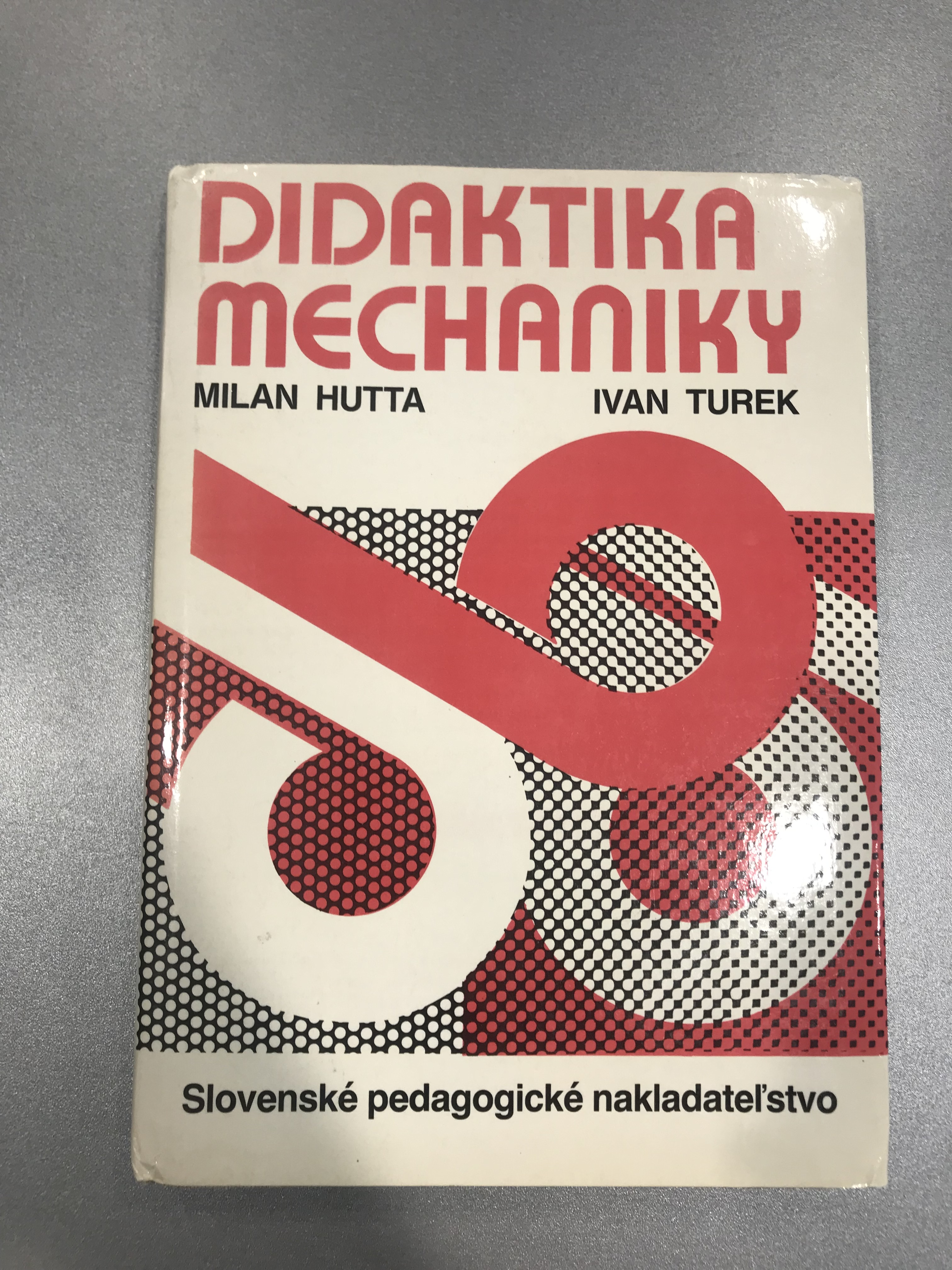 Didaktika Mechaniky